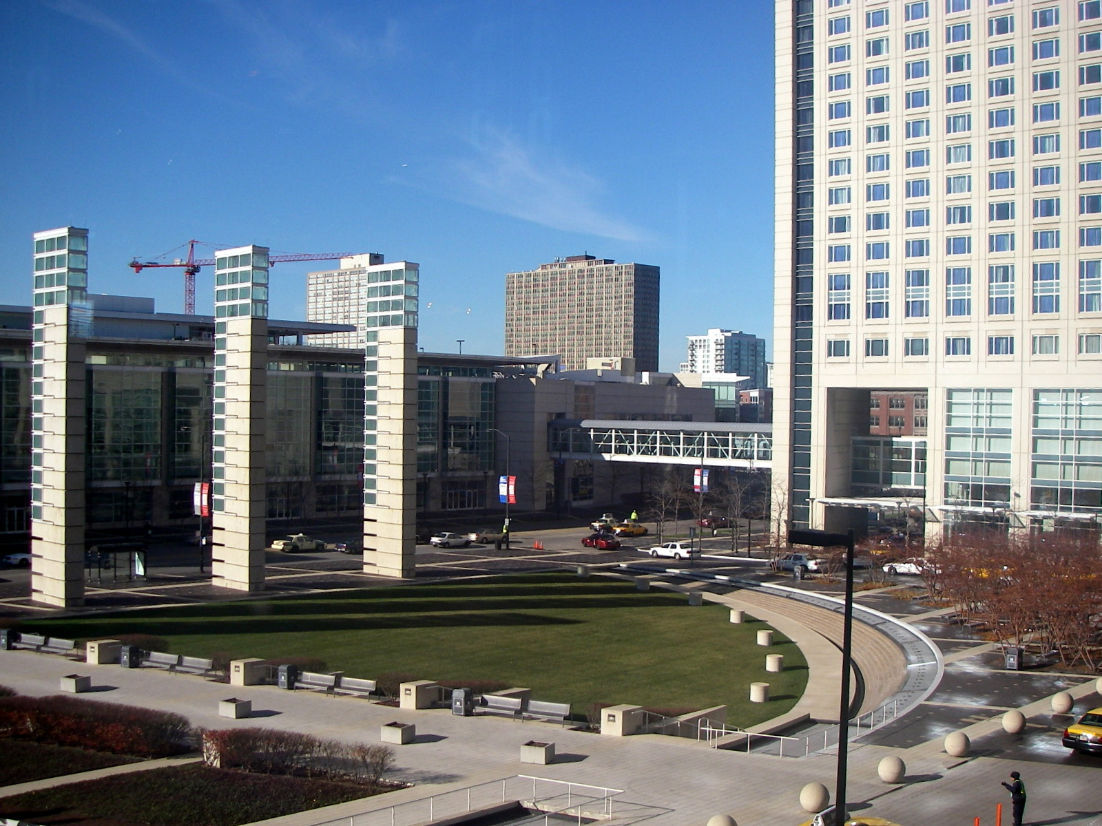 McCormick Place. Вид на западное крыло из главного вестибюля.